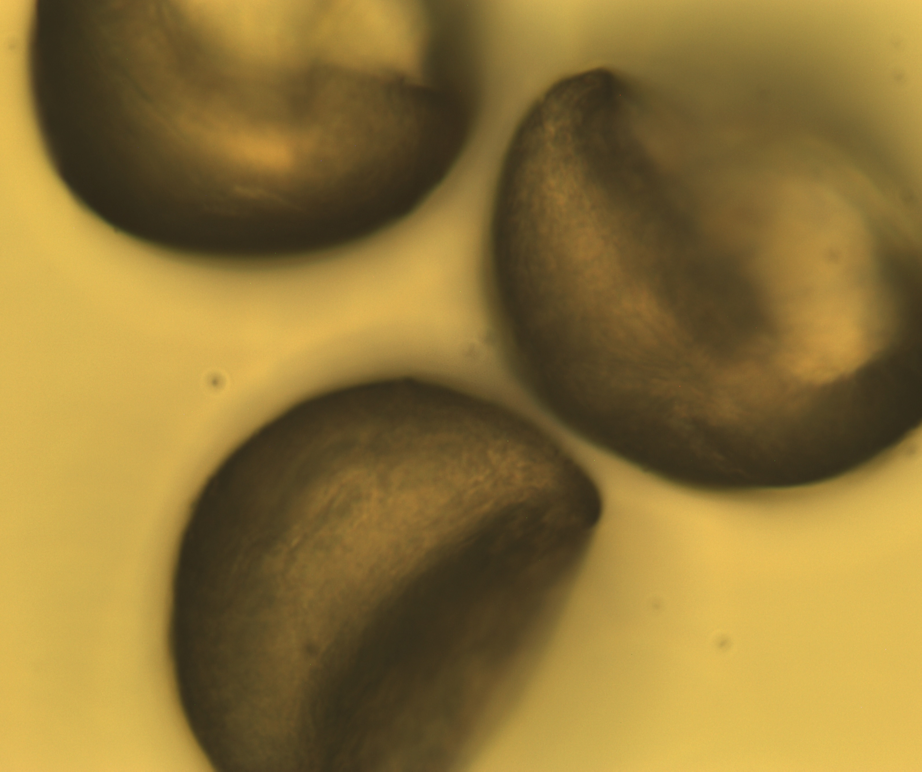 Larix Pollen 400x